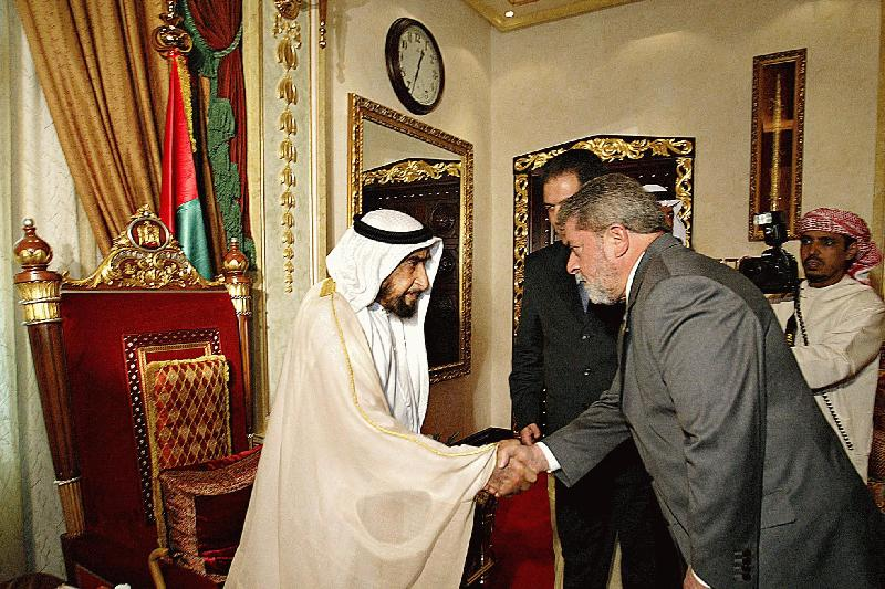 Presidentes dos Emirados Árabes (Zayed bin Sultan Al Nahyan) e Brasil (Lula).